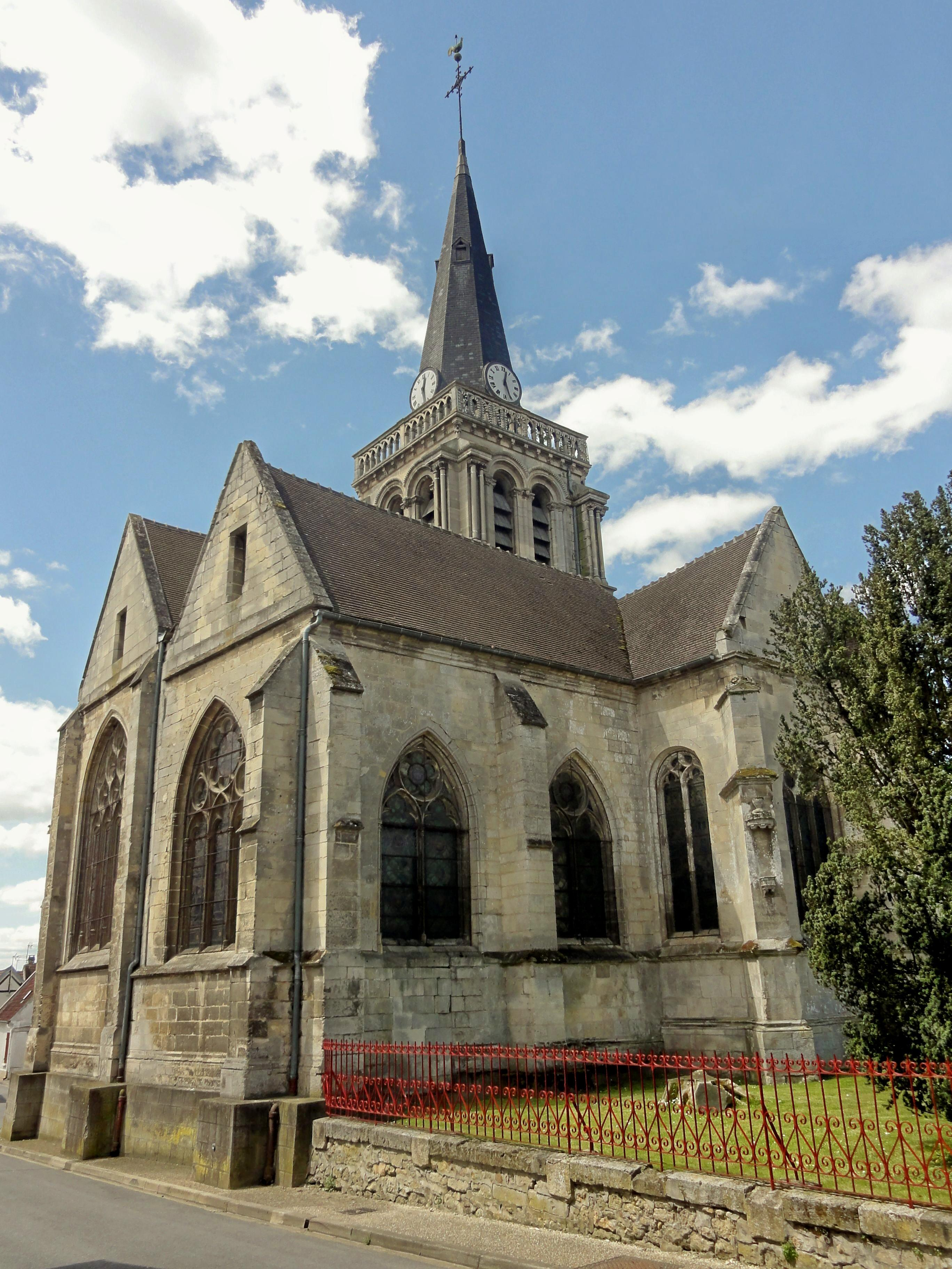 Vue partielle depuis le nord.